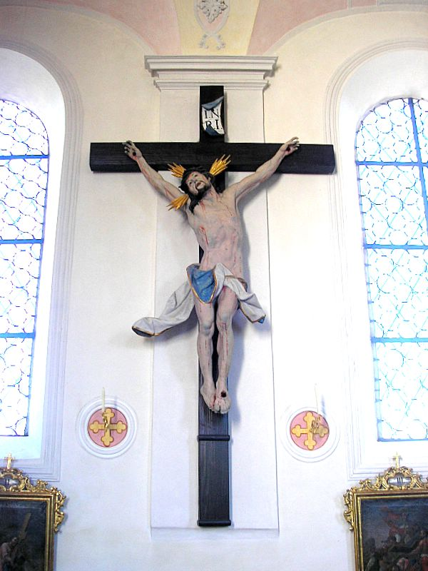 Bad Bayersoien (Landkreis Garmisch-Partenkirchen, Oberbayern). Pfarrkirche St. Georg. Kreuz an der südlichen Langhauswand. Eigene Aufnahme, Mai 2007 / Bad Bayersoien (Upper Bavaria, Germany). Parish church St. George. Interior. Cross at the south side of the nave. Own photo, May 2007